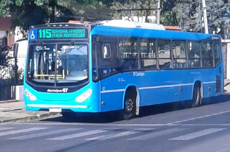 Mercedes-Benz O-500 de la línea 115 operado por la empresa El Cacique Rosario.